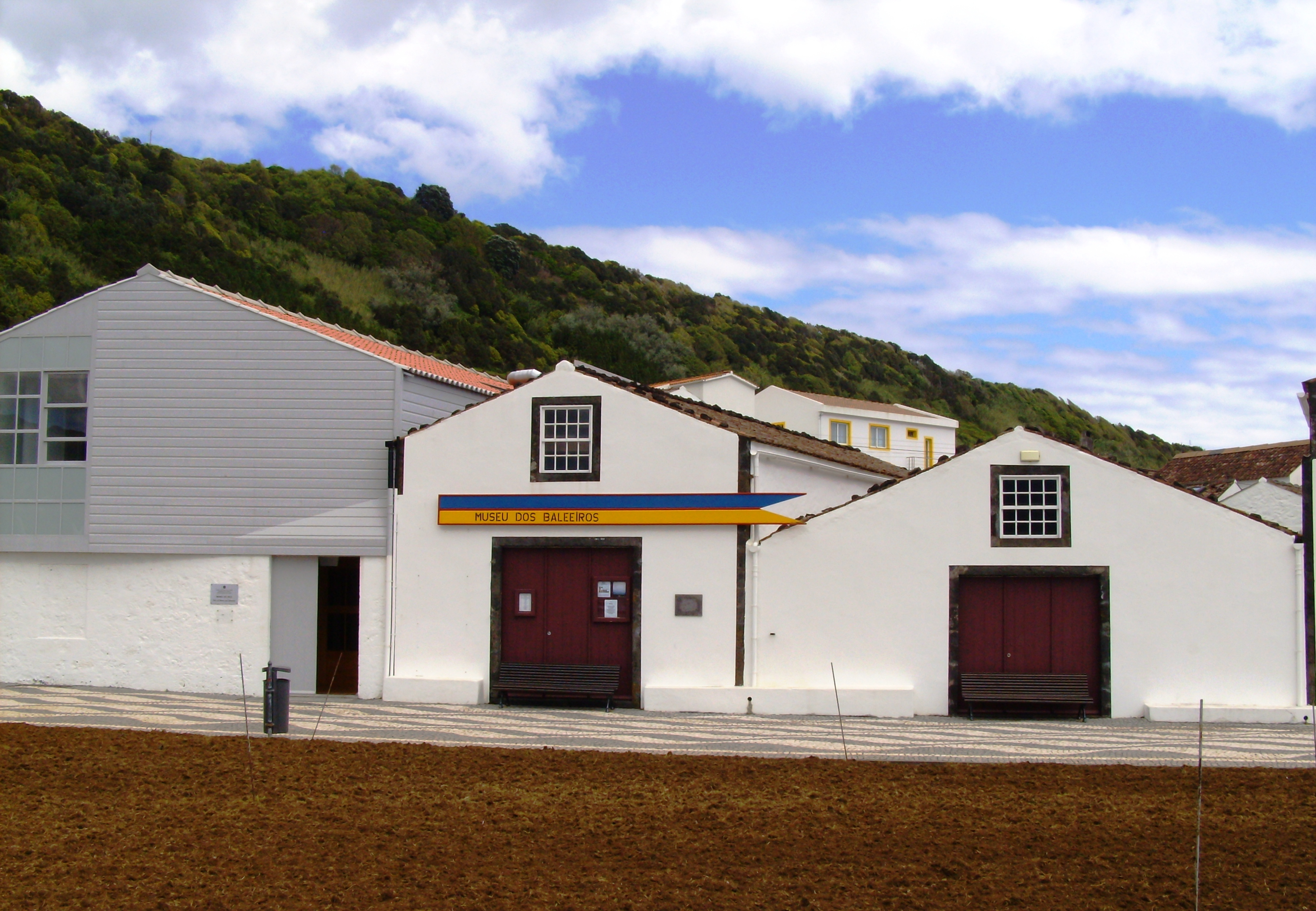 Museu dos Baleeiros, freguesia e concelho de Lajes do Pico, ilha do Pico, Açores.